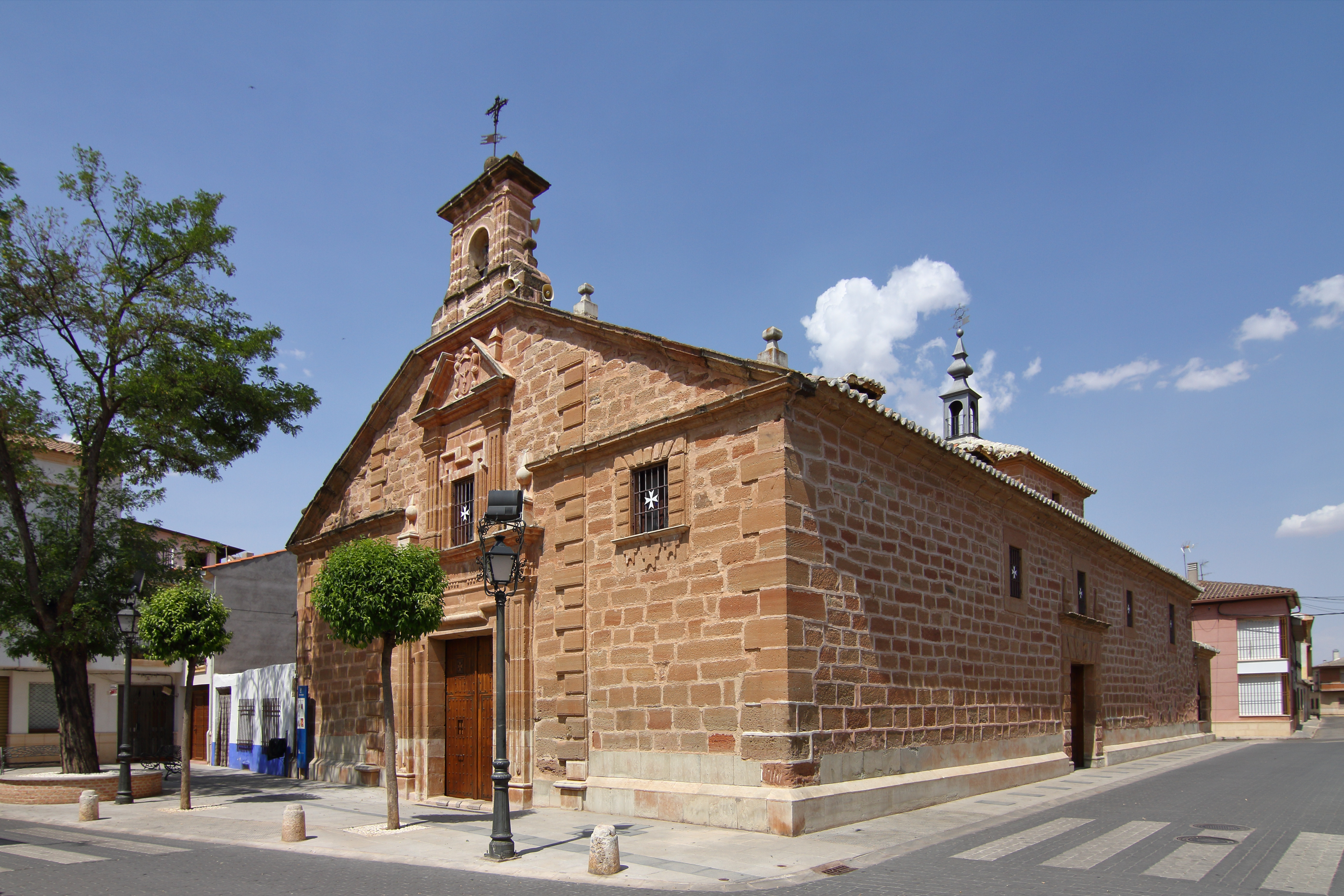 Villafranca de los Caballeros, Ermita del Cristo de Santa Ana, s. XVIII